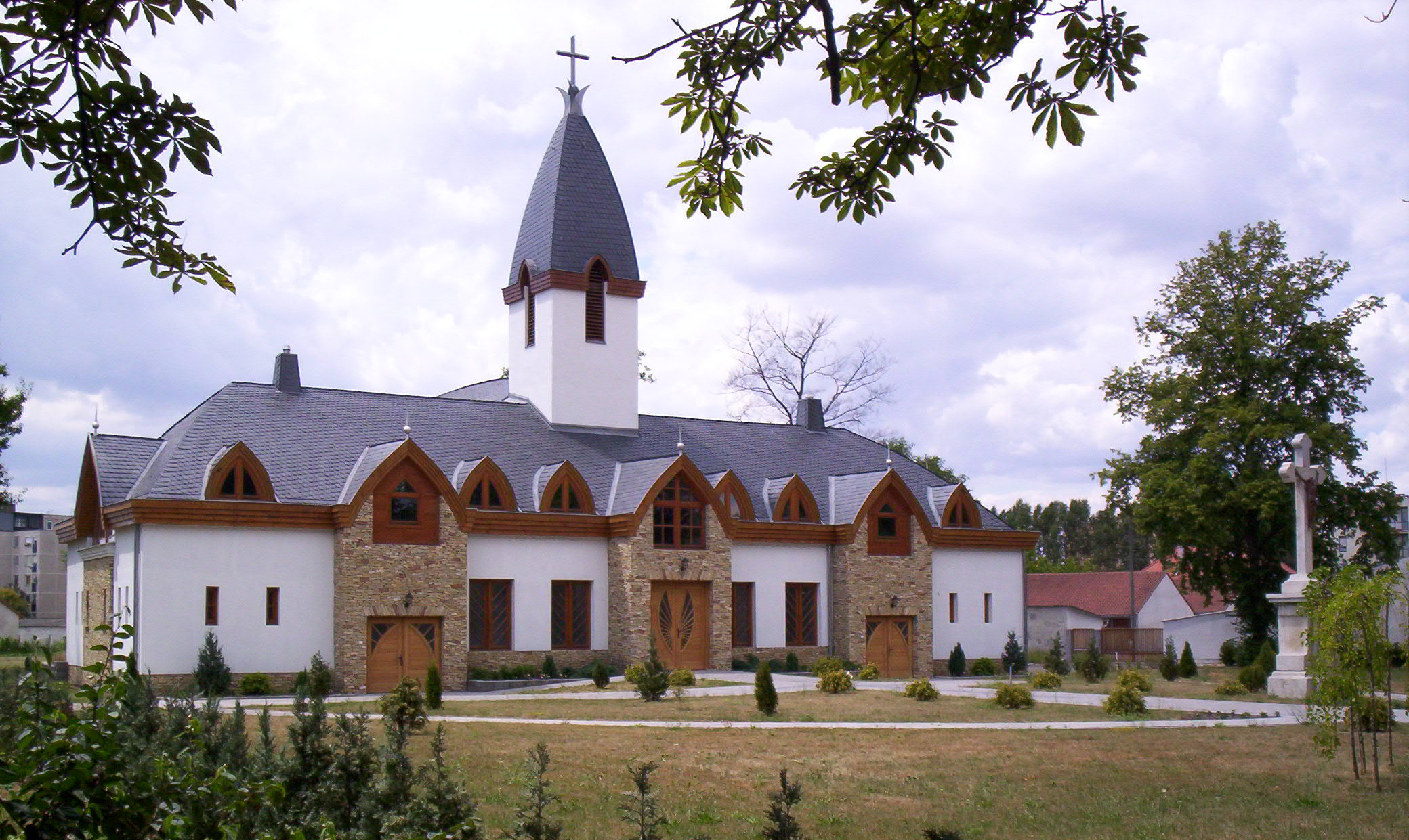 St Joseph chapel in Pápa, Hungary A pápai Szent József-kápolna